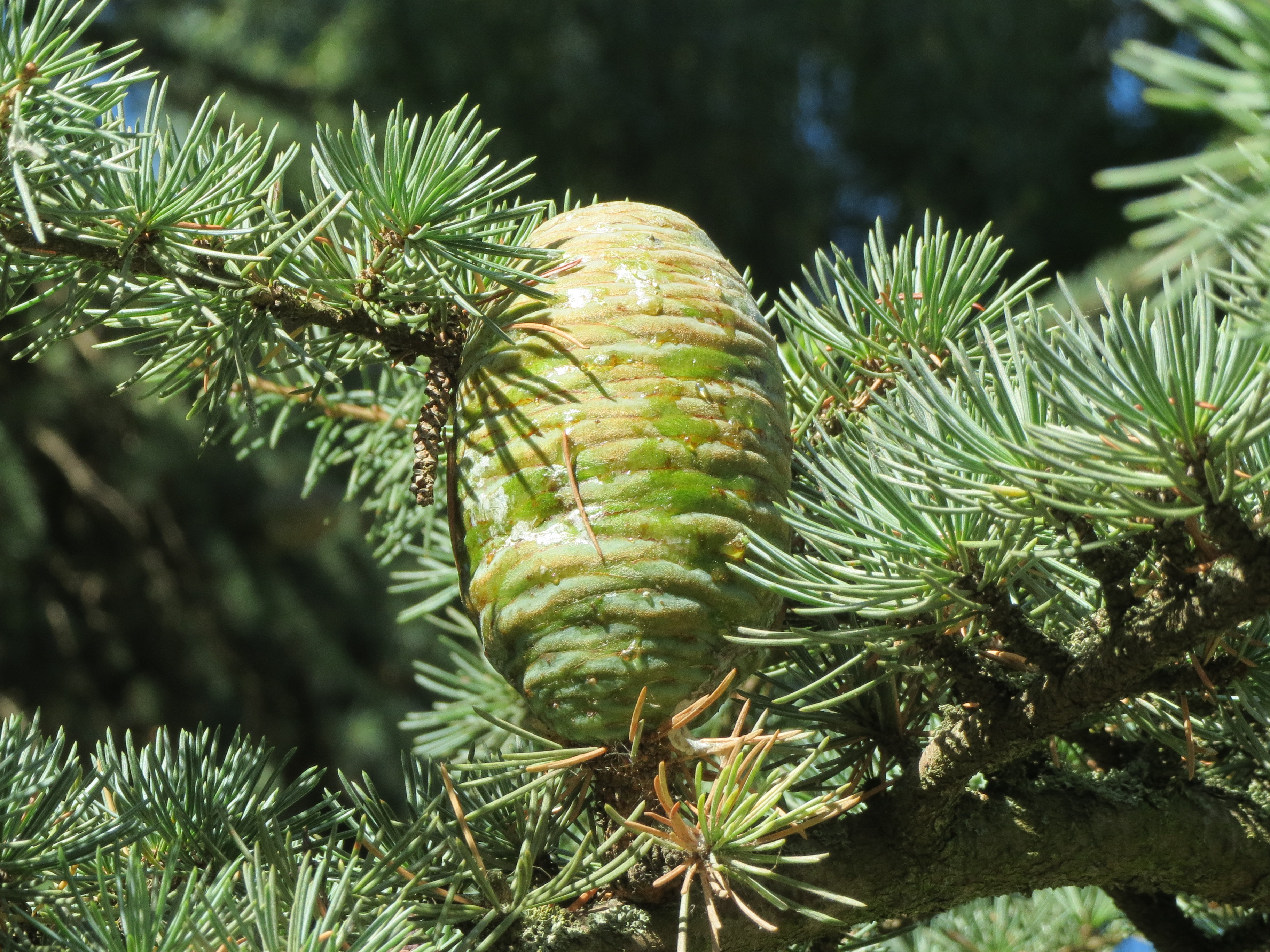 Himalaya-Zeder (Cedrus deodara) in Saarbrücken